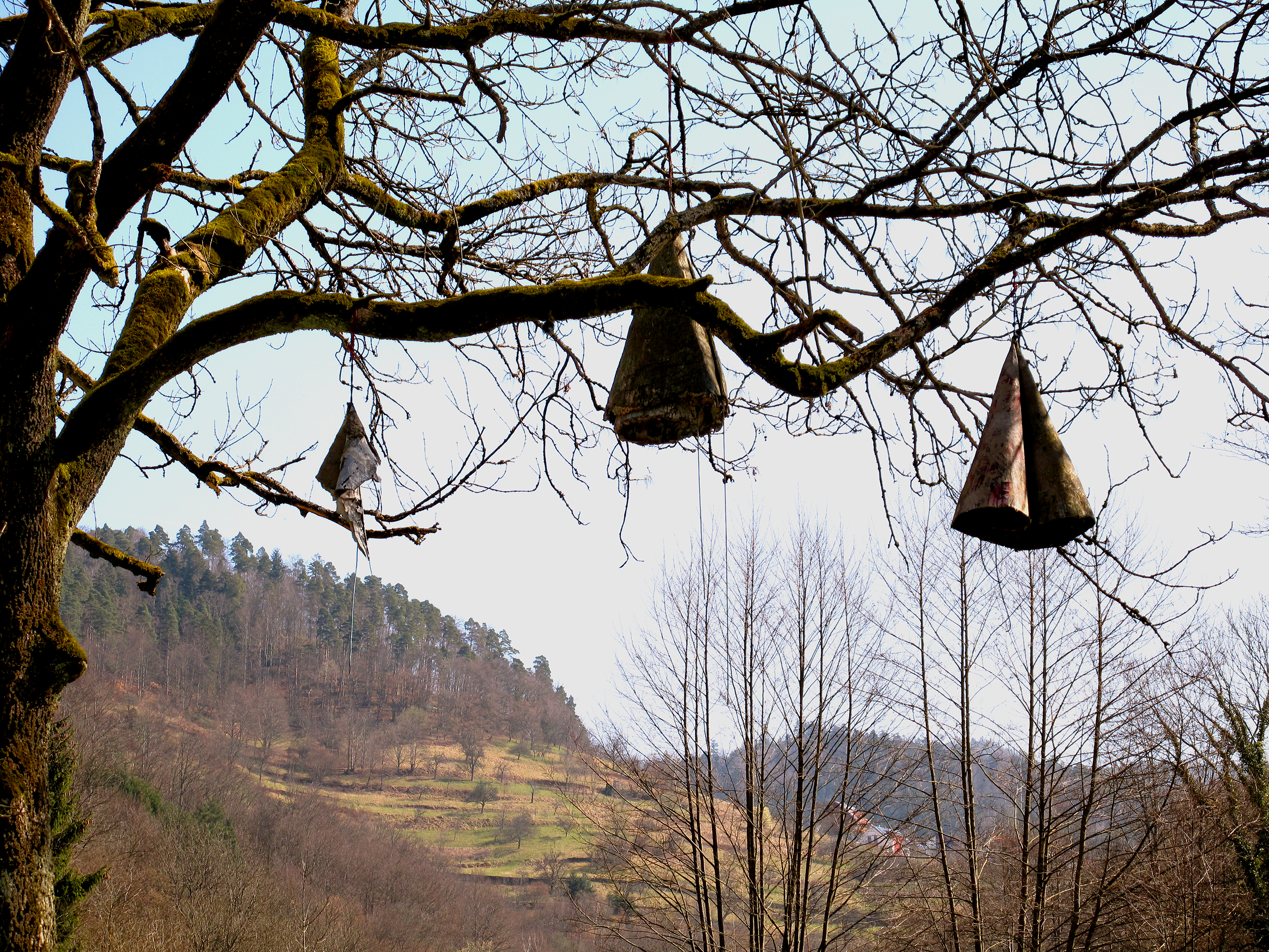 Josef Bücheler, Glockenbaum, 2007, - Deutschland, Baden-Württemberg, Gernsbach, Kunstweg am Reichenbach